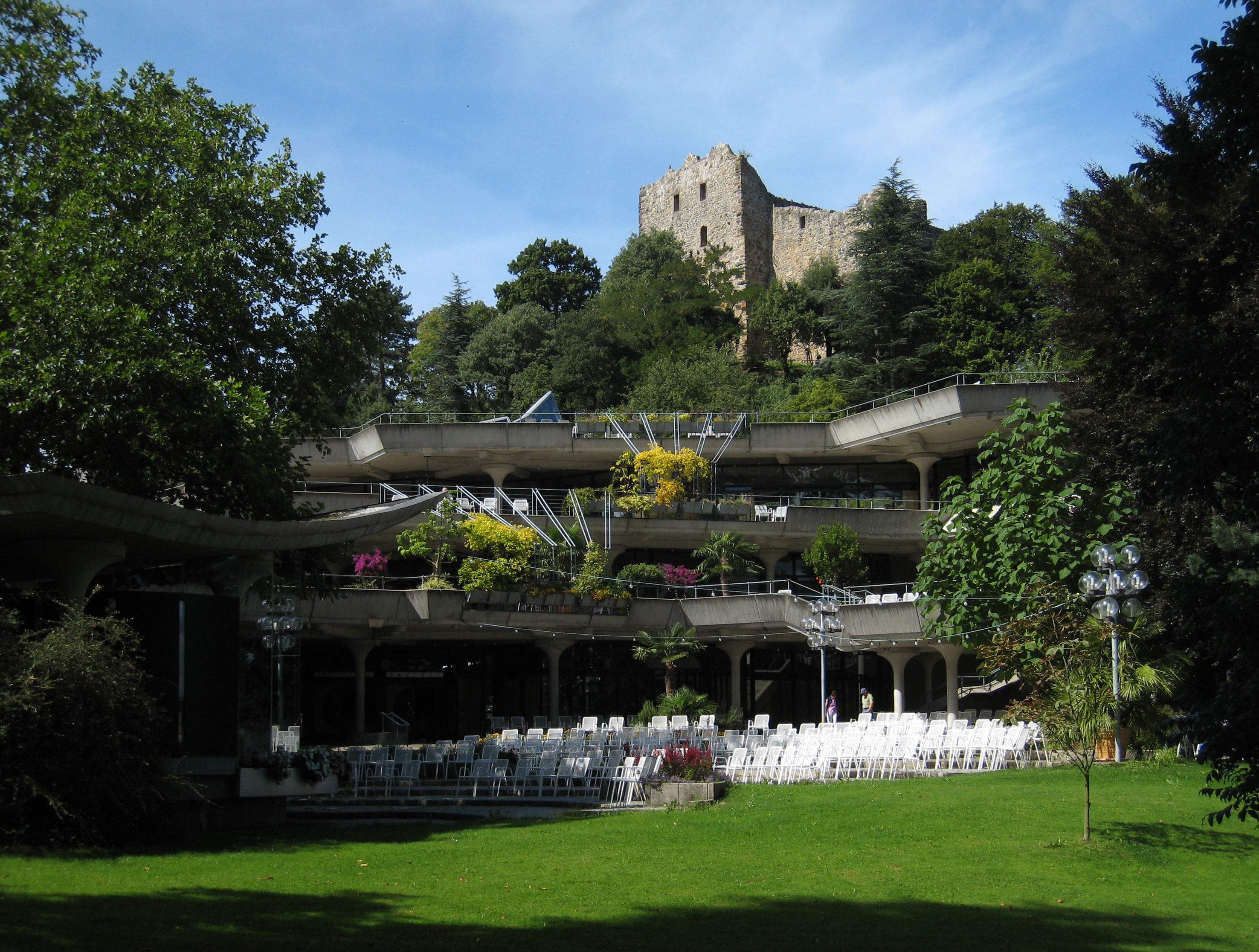 Ebene des Wiesengeschosses des Kurhauses von Badenweiler. Badenweiler/Süd-Schwarzwald/Deutschland